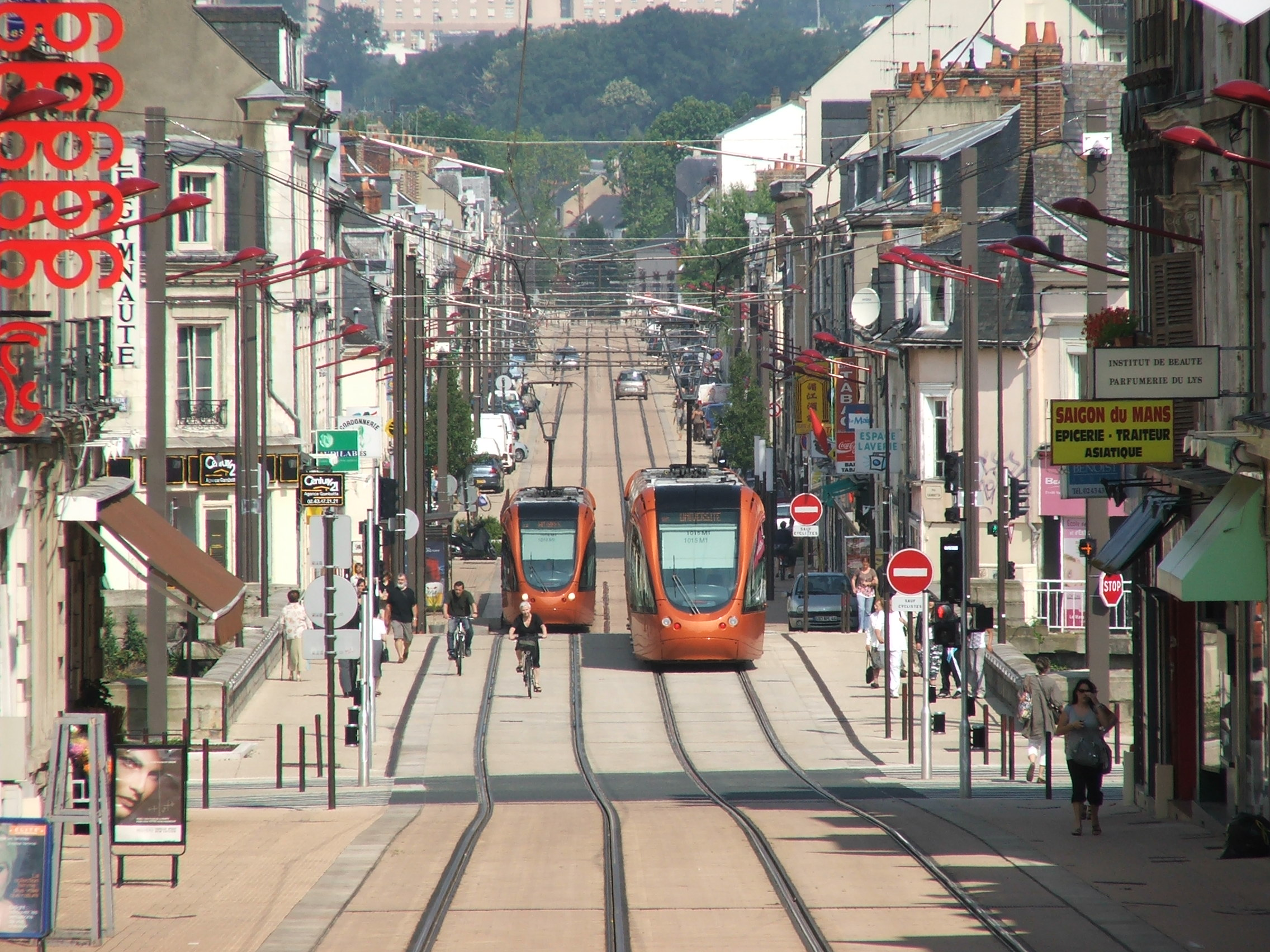 Vue sur la rue Gambetta avec deux tramways dans le quartier des Halles au Mans.